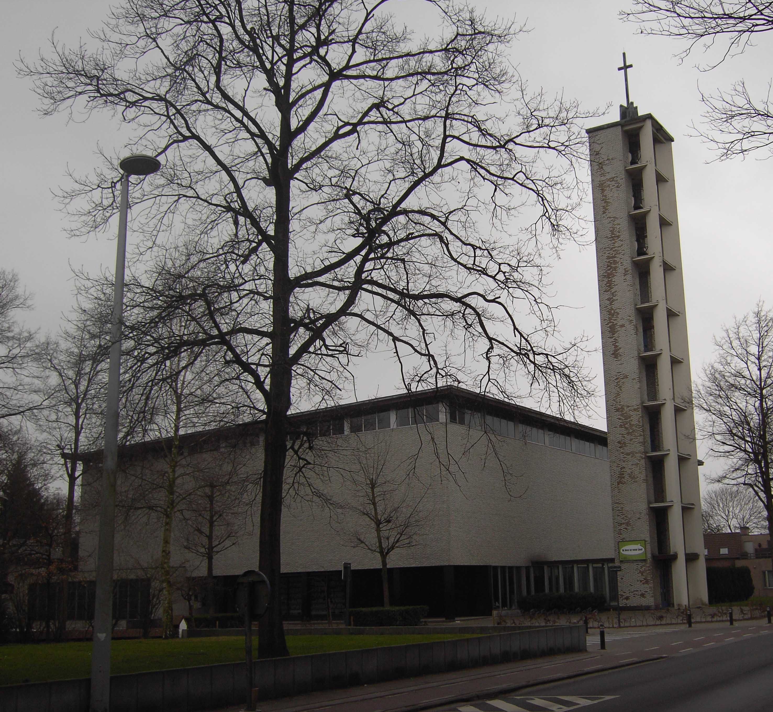 Eeklo - Onze Lieve Vrouw Hemelvaart - church